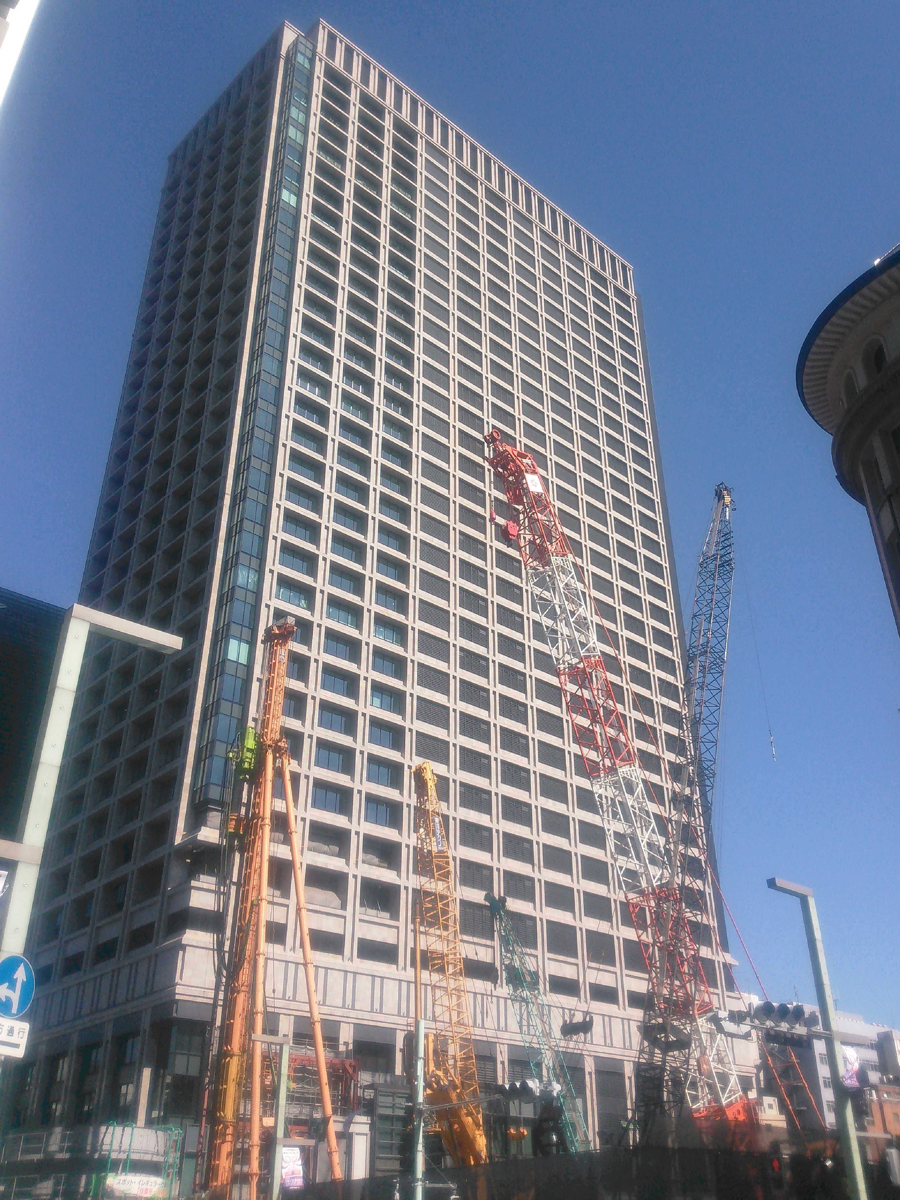 東京都中央区日本橋2丁目、東京日本橋タワー